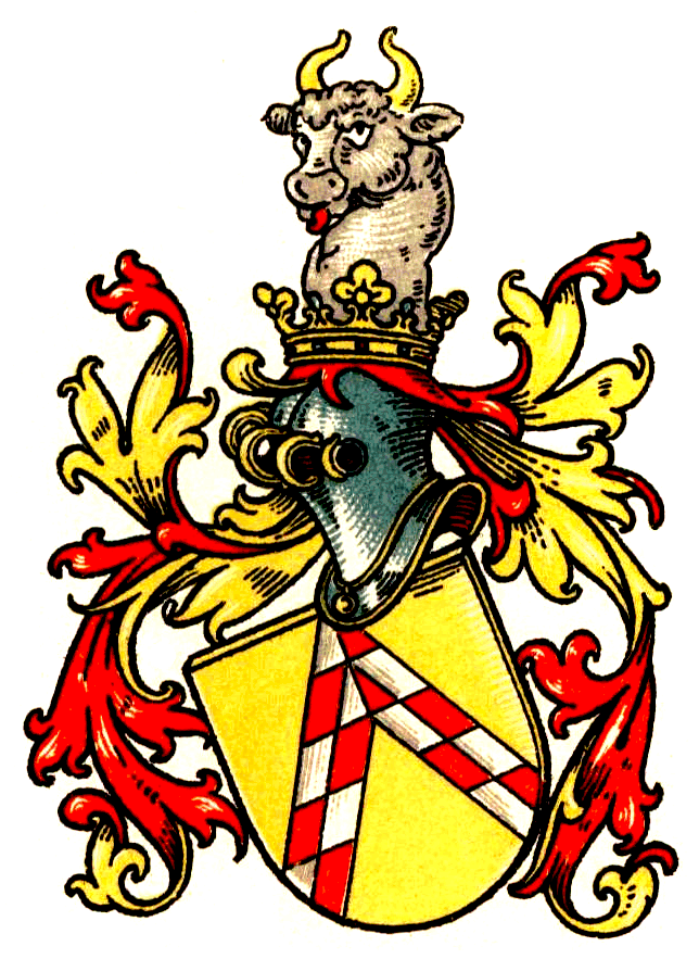 Wappen der Heereman von Zuydtwyck